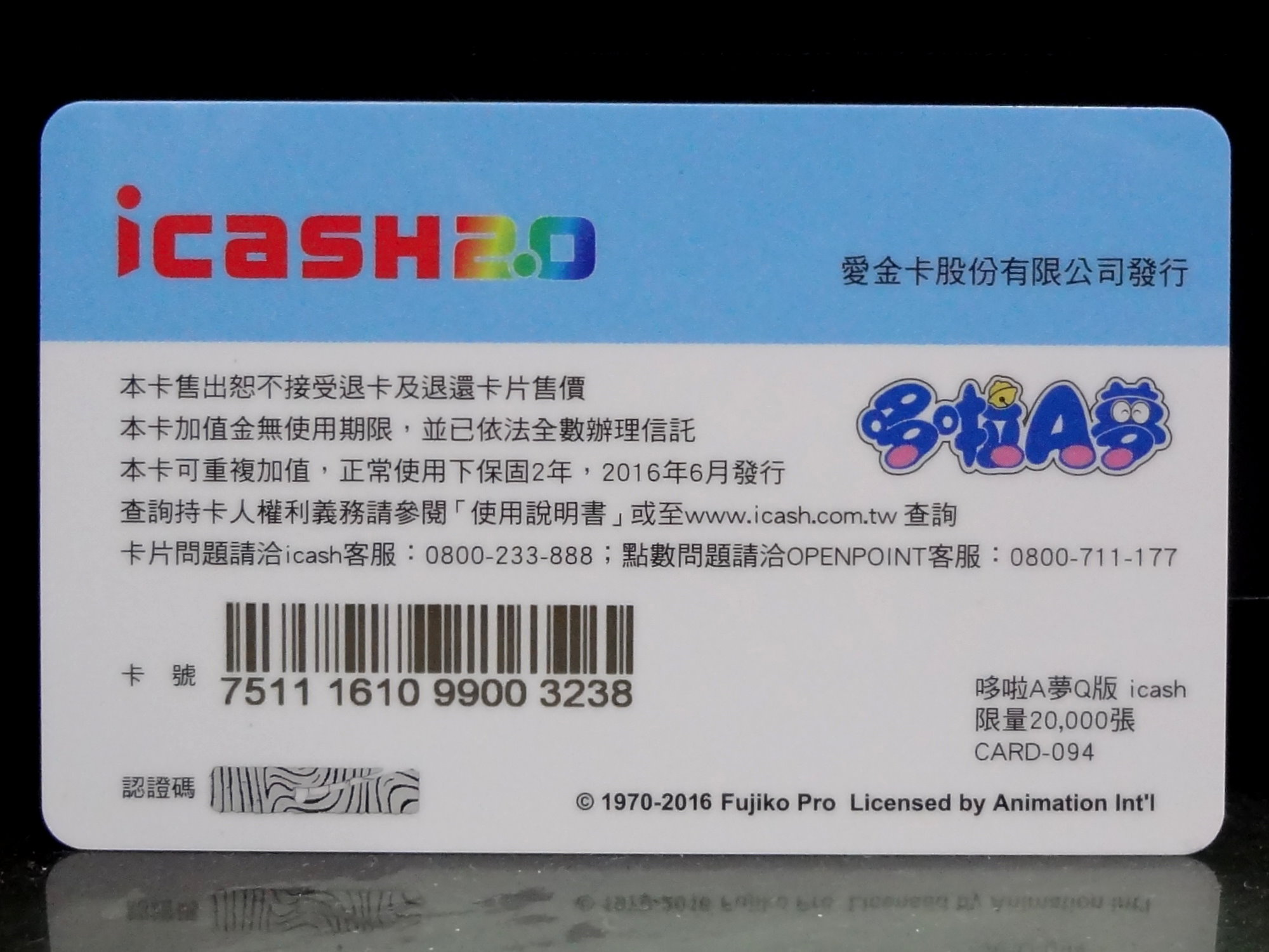 2016年6月愛金卡公司發行的icash 2.0哆啦A夢Q版限定卡背面。